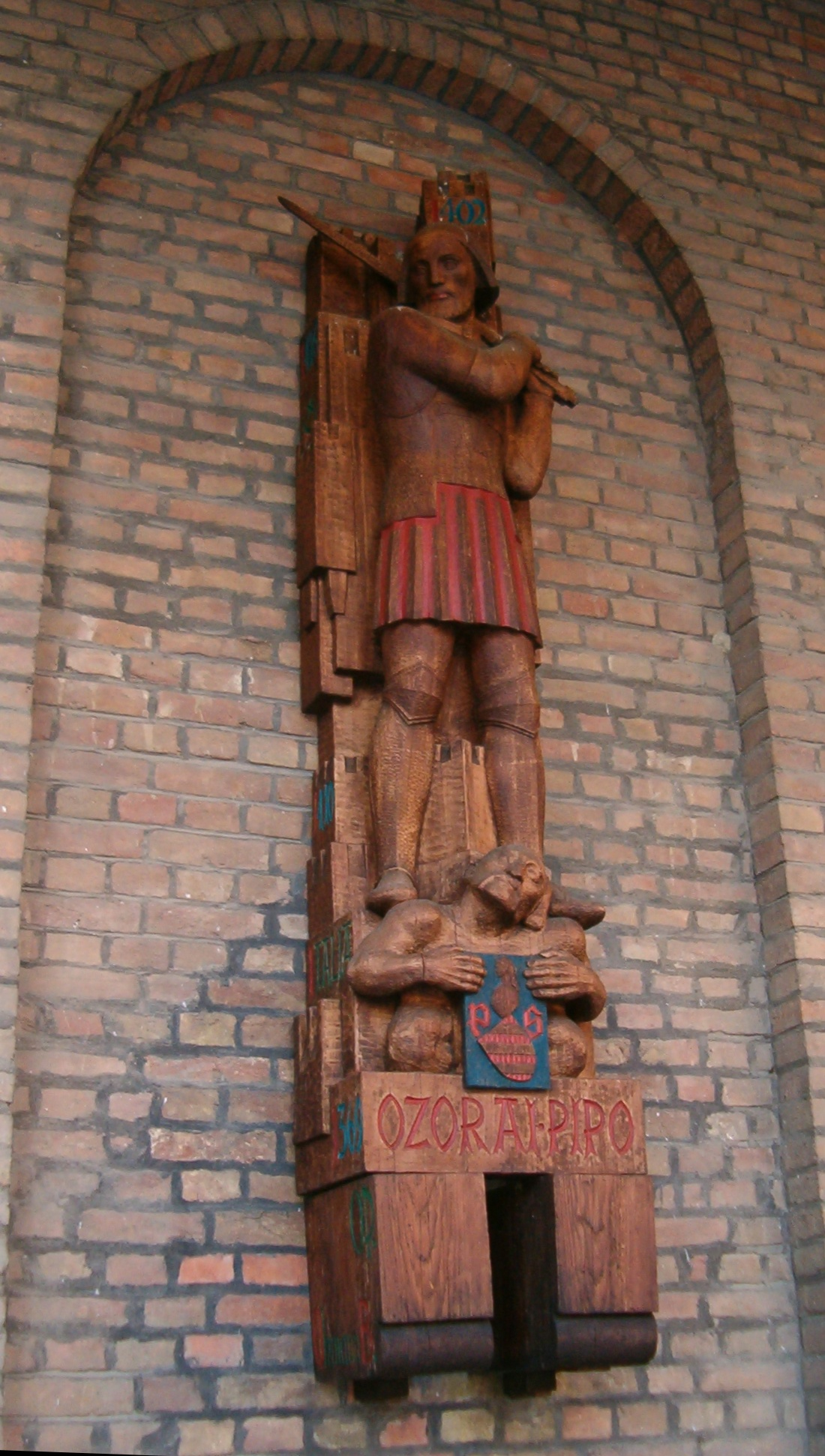 Ozorai Pipó (Ohmann Béla alkotása) photo by uploader